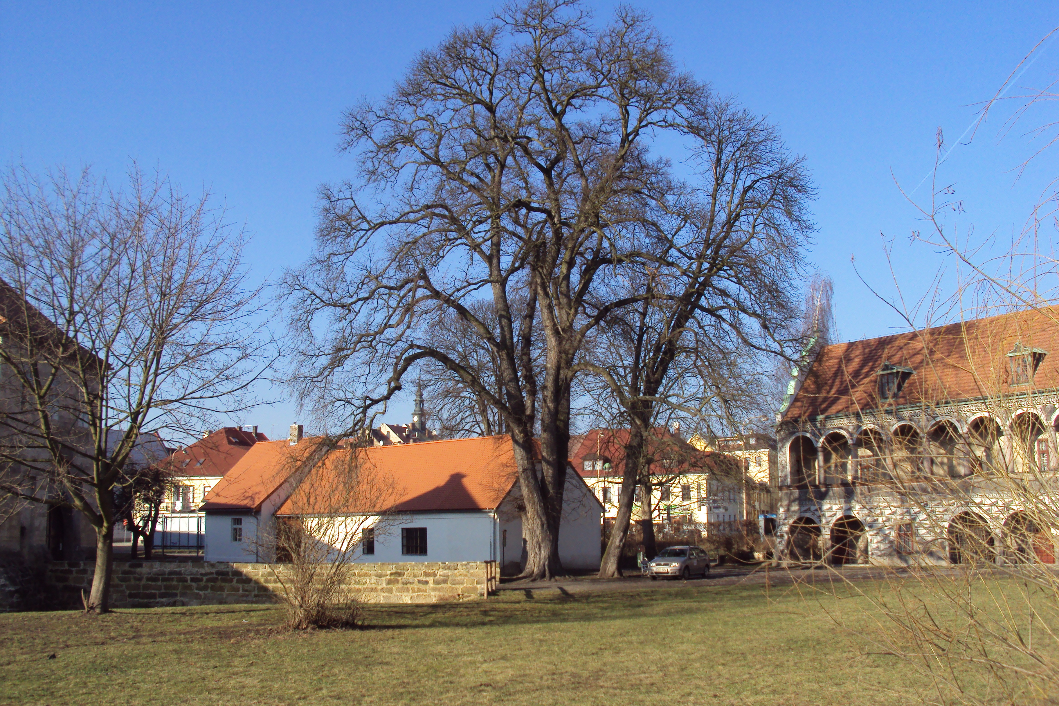 Památné stromy, jilmy před vodním hradem Lipý, střed města Česká Lípa